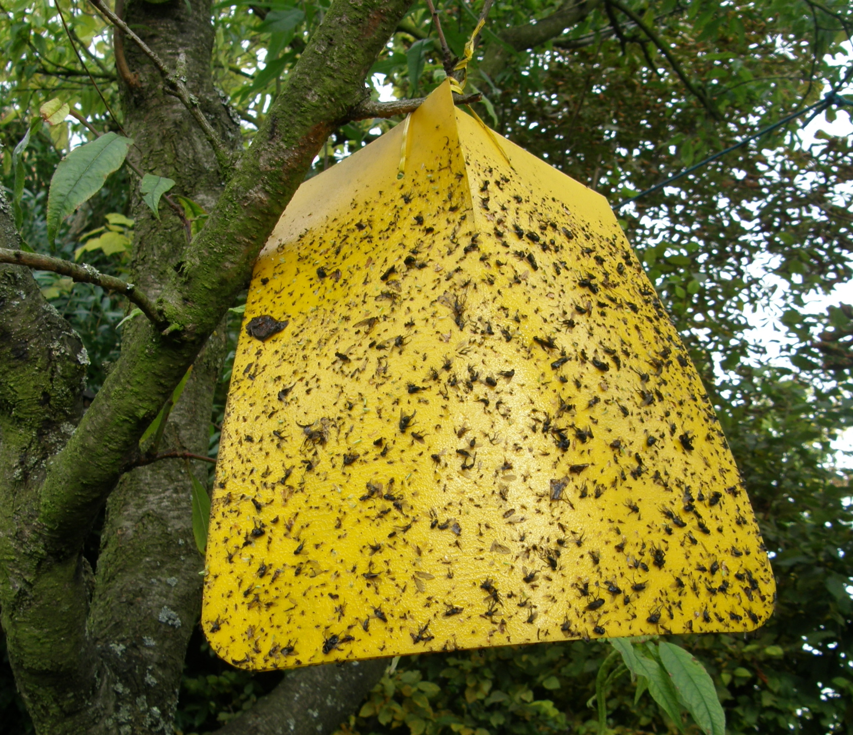 Voller Gelbsticker